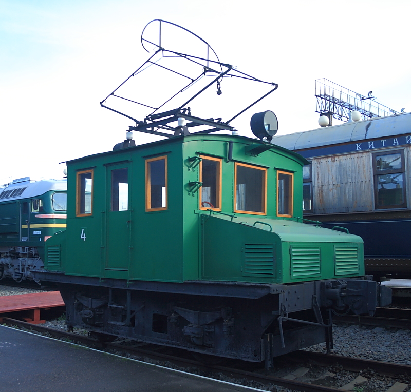 Промышленный электровоз серии ЭП в железнодорожном музее Петербурга. Старейший сохранившийся отечественный промышленный электровоз.